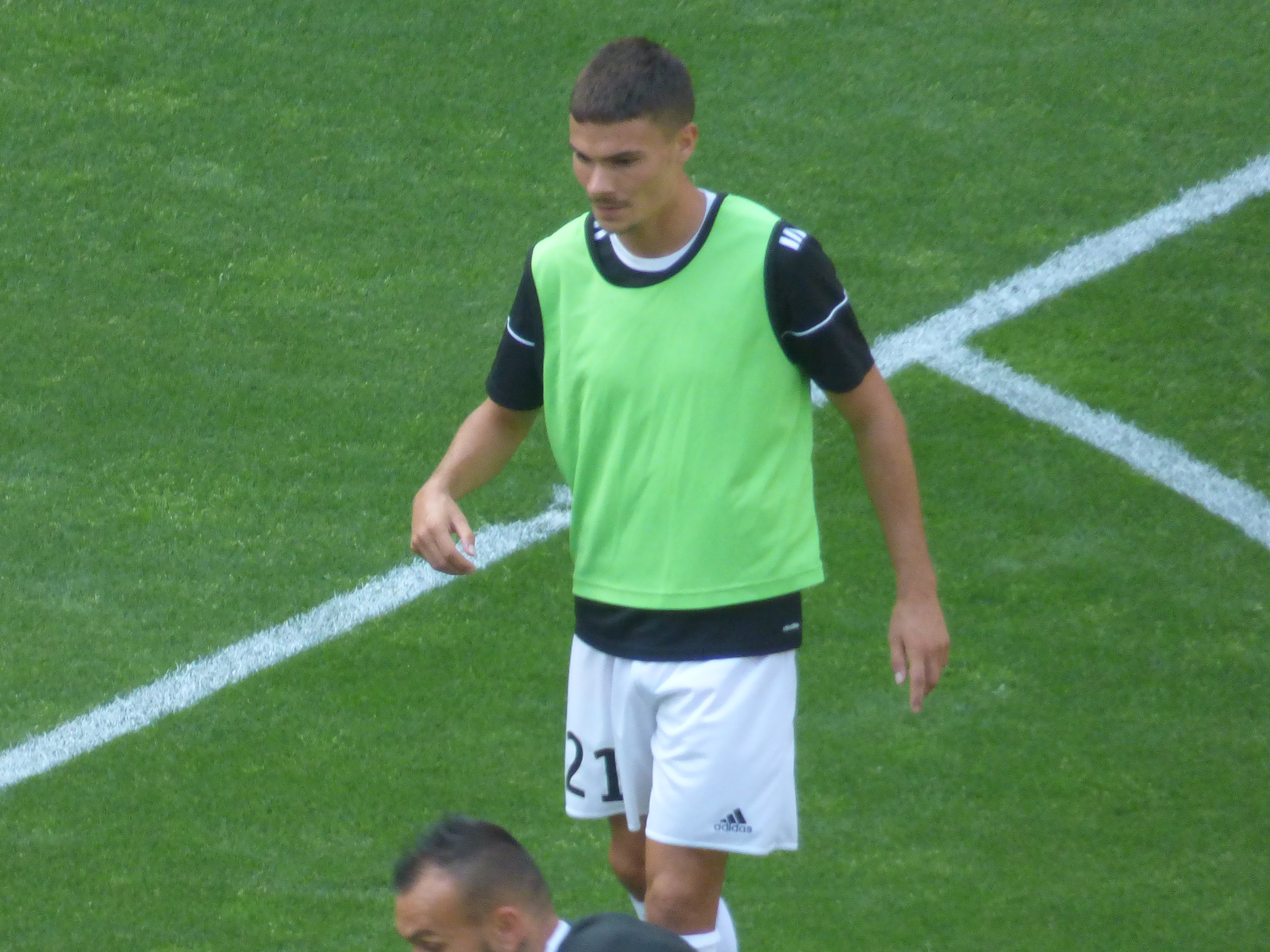 Grégoire Lefebvre avant le match RC Lens / Red Star, comptant pour la deuxième journée du championnat de France de Ligue 2 2018-2019 au Stade Bollaert-Delelis, le 4 août 2018.